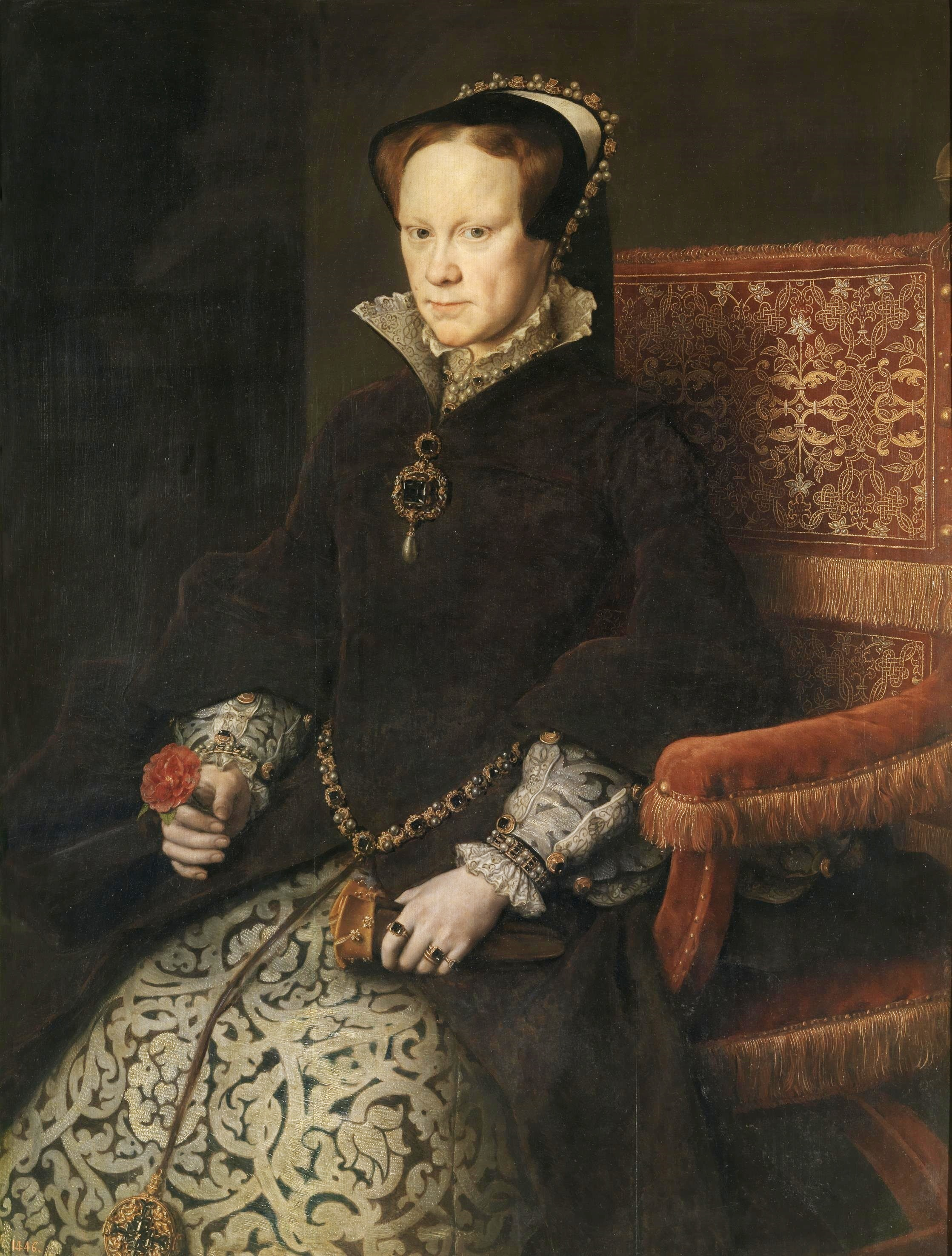 Retrato de la reina María I de Inglaterra (1516-1558), más conocida como María Tudor, que fue hija del rey Enrique VIII de Inglaterra y de la reina Catalina de Aragón y reina consorte de España por su matrimonio con Felipe II, hijo del emperador Carlos I de España.